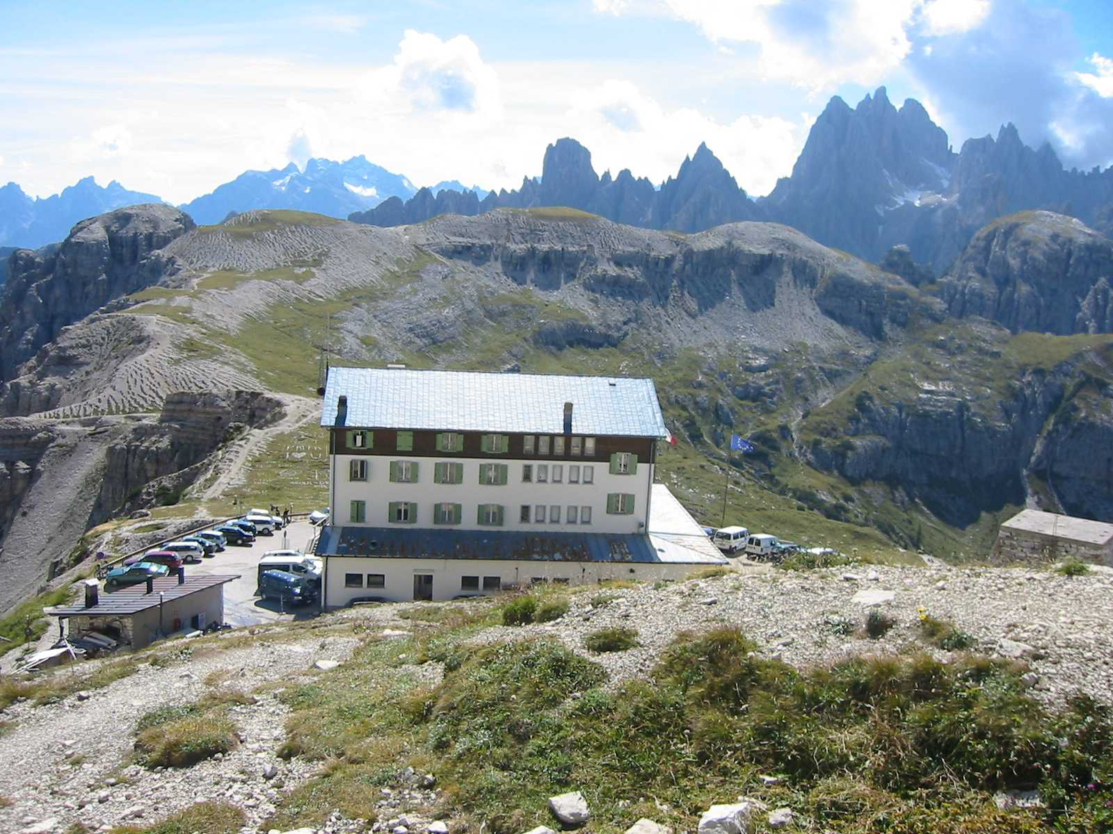 Auronzohütte in den Dolomiten